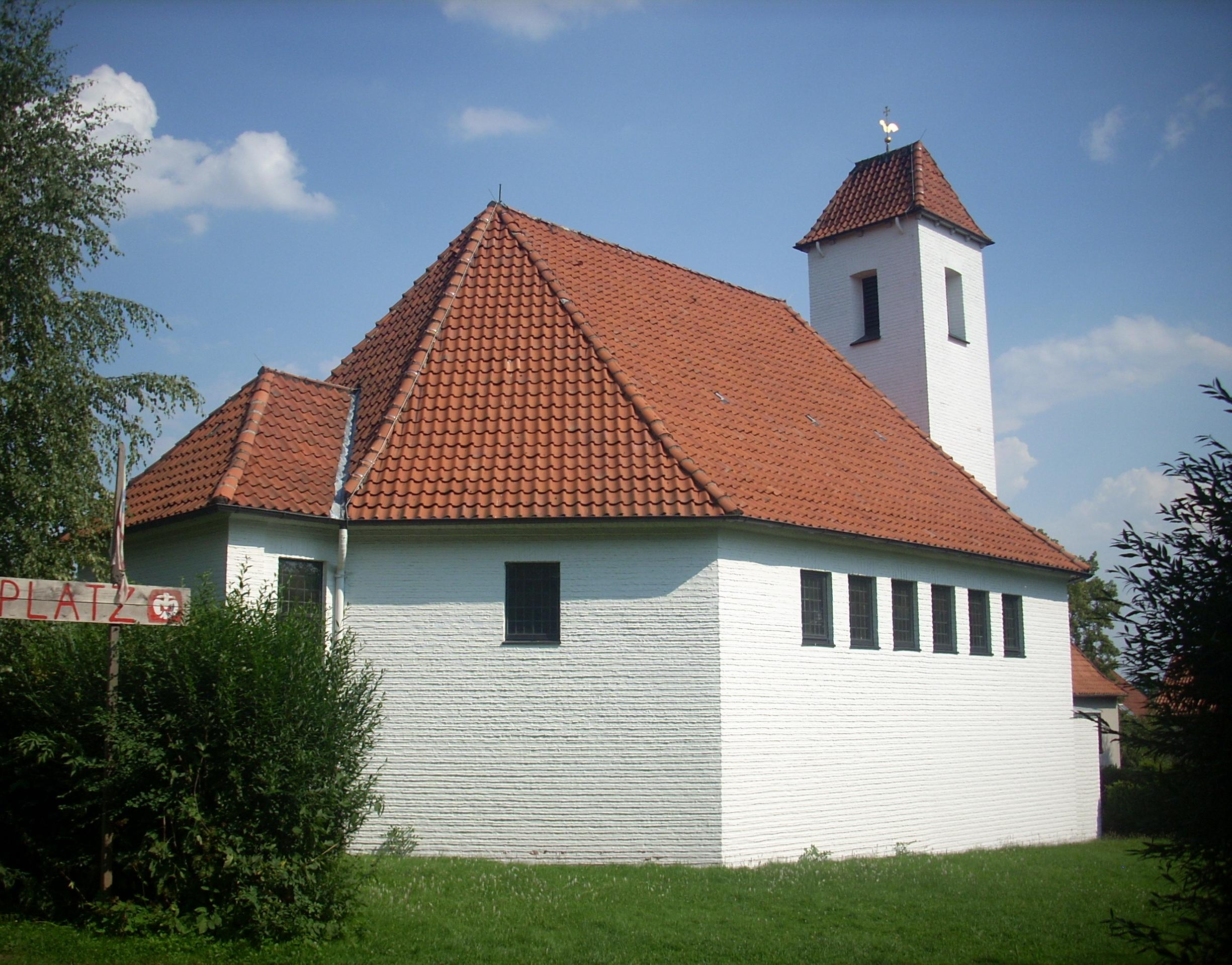 Elze, Kath. Kirche St. Petrus zu den Ketten